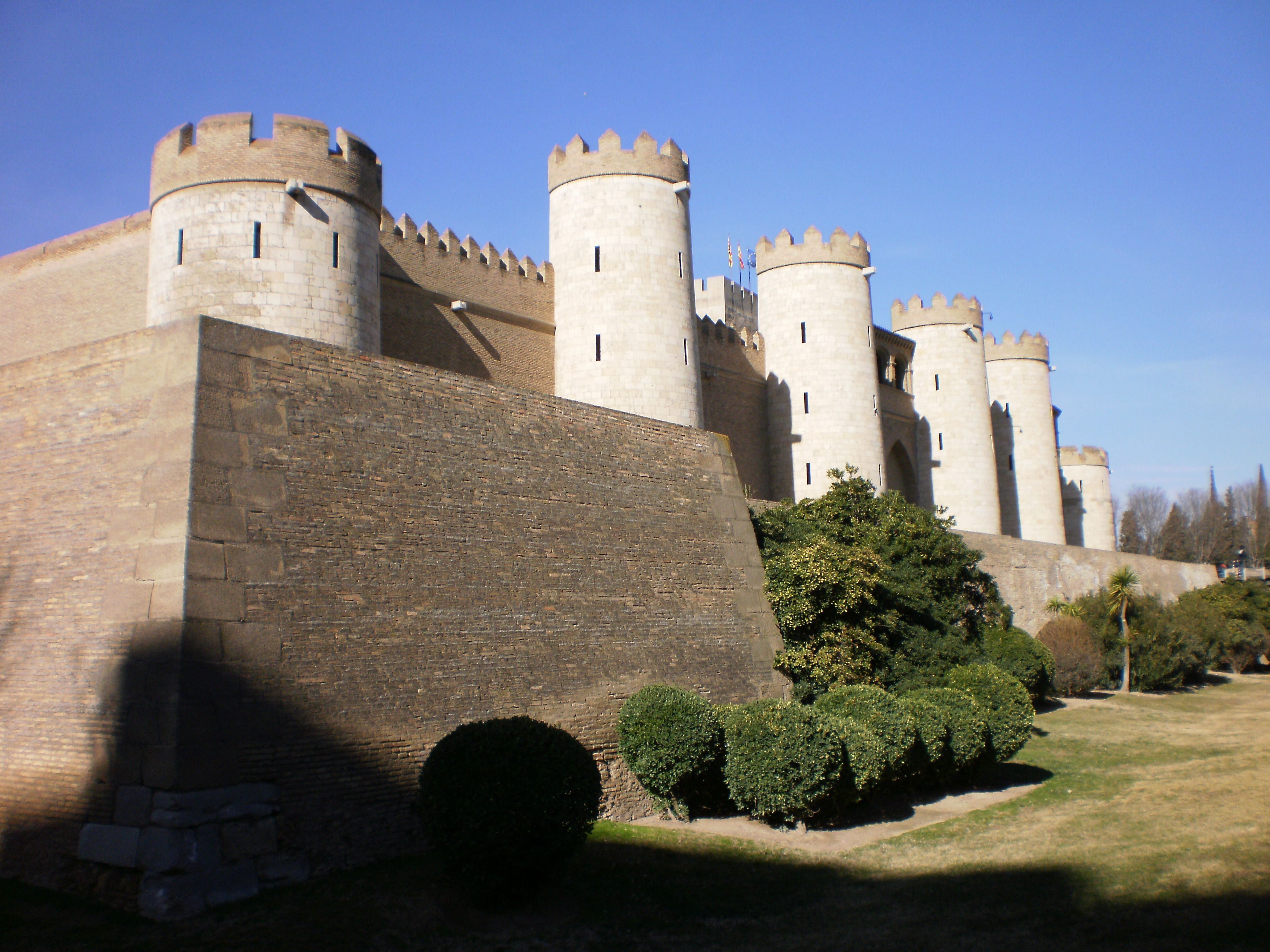 La Aljafería, Zaragoza